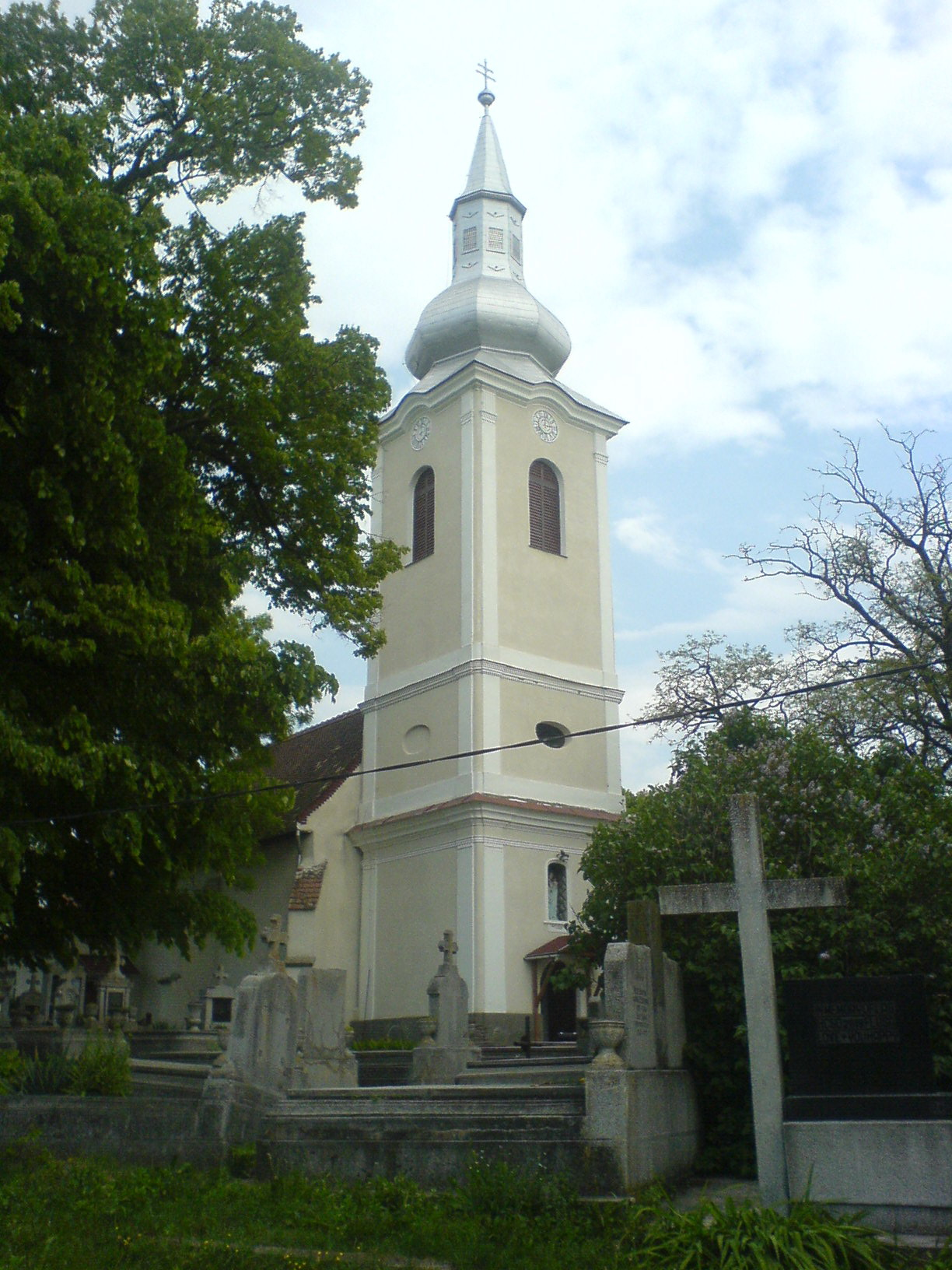 Marosszentgyörgy római katolikus temploma a templomkertből (Erdély)